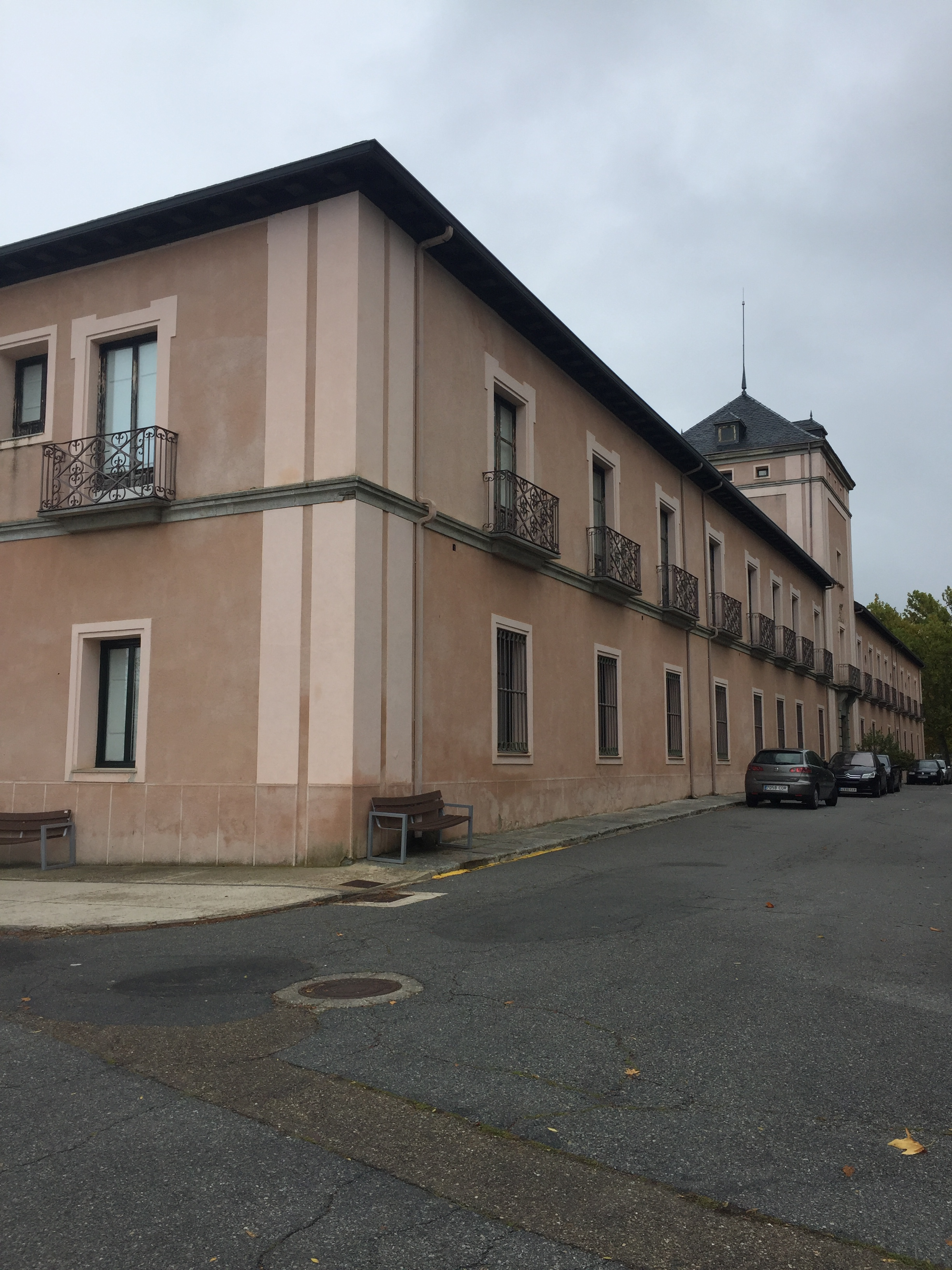 Fachada principal de la casa palacio de la Real Quinta de Quitapesares desde el este